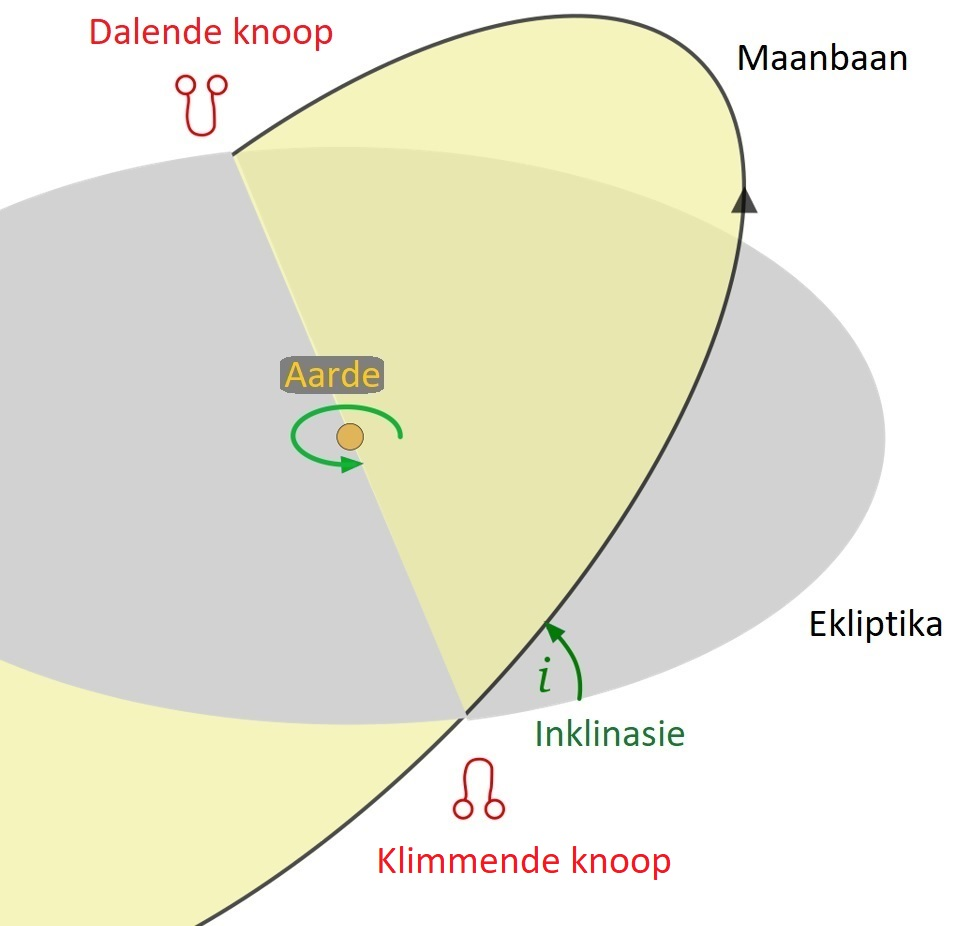 Die klimmende (☊) en dalende (☋) maansknope uitgebeeld met 'n oordrewe inklinasie tussen die sonnebaan (of ekliptika) en maanbaan.